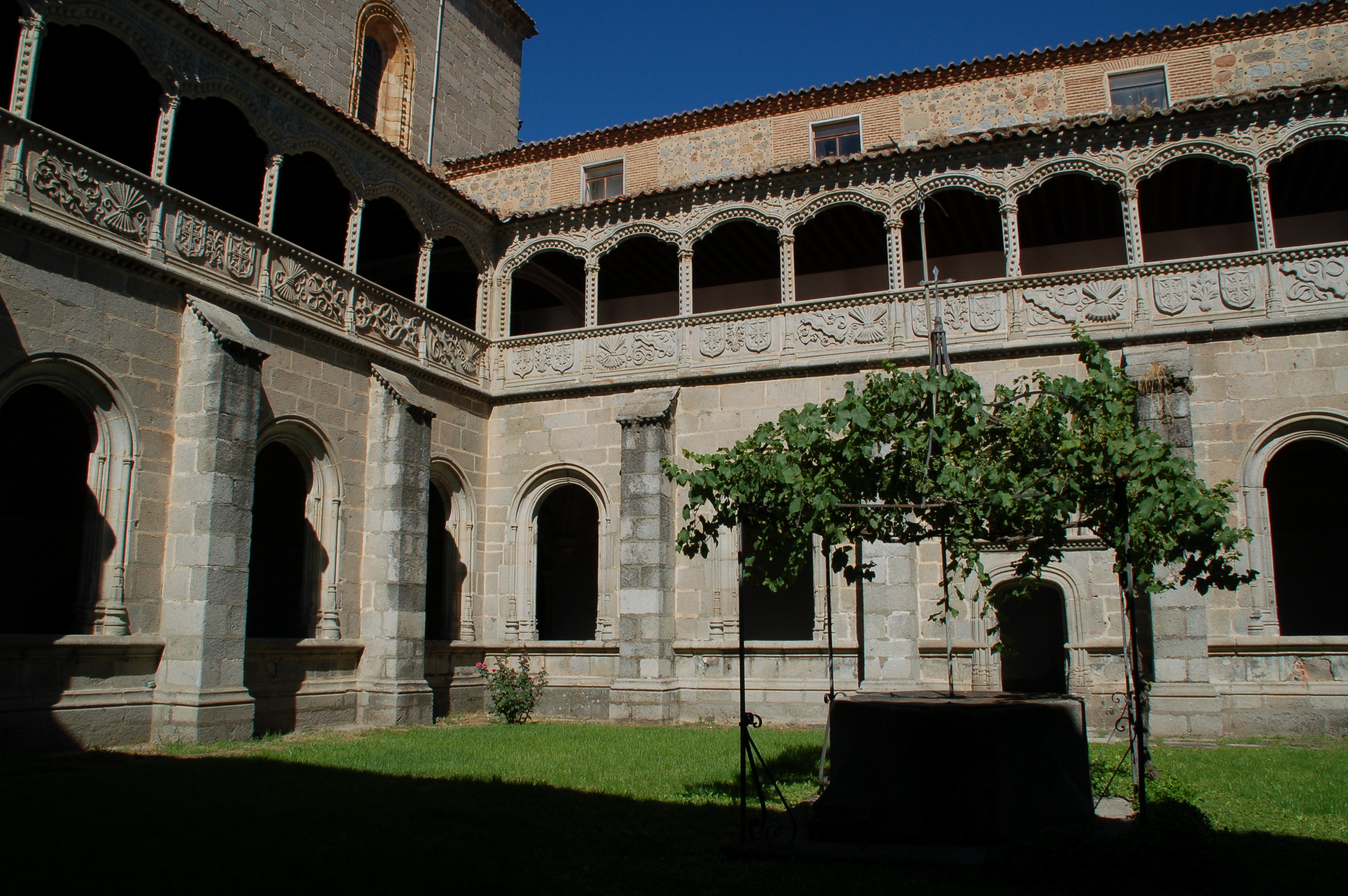 Monasterio de Santo Tomas en Ávila. Claustro del Silencio.